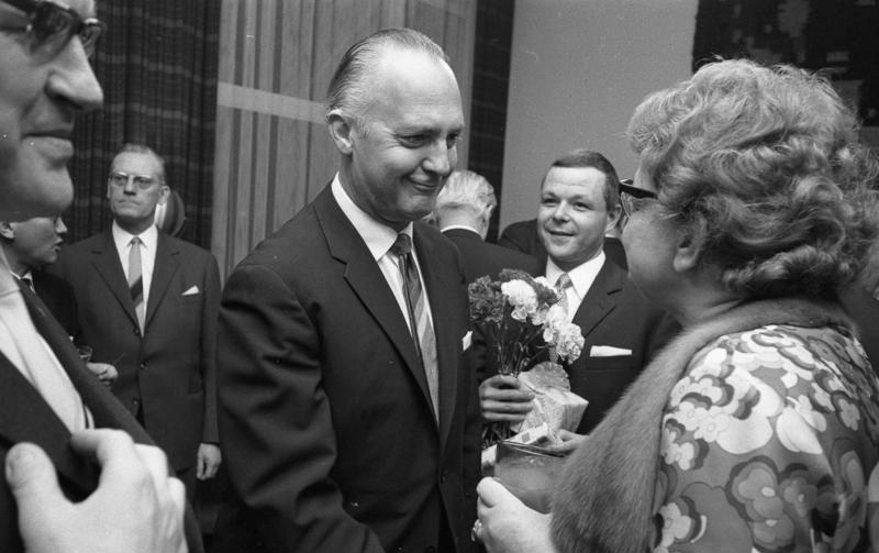 Empfang der La. Vertr. Niedersachsen anl. Geburtstag von Frau Min. Maria Meyer-Sevenich (v.l.n.r.: Herr Wächter, Geschäftsführer der Vereinigten Landsmannschaften Mitteldeutschands, Bonn; Asher Ben-Natan, Botschafter von Israel; Regierungsrat Dr. Lufft, Vertretung Niedersachsen; Frau Minister Meyer-Sevenich)